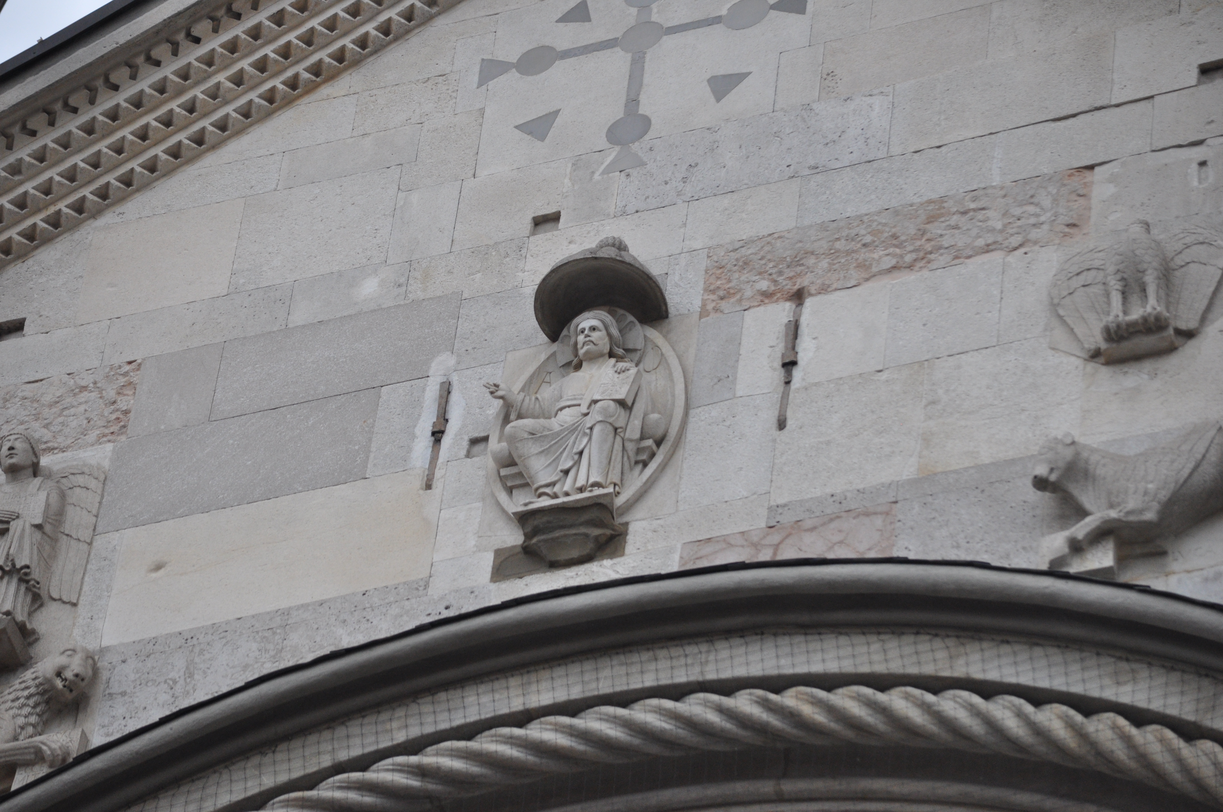 Duomo (solo esterni) This is a photo of a monument which is part of cultural heritage of Italy.